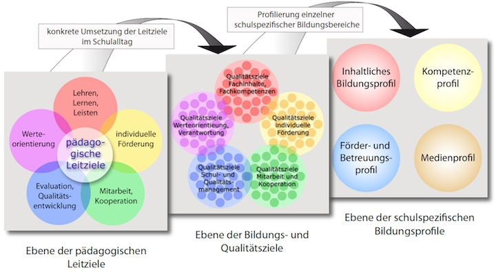 Hier finden Sie den ersten Teil des internen Schulprogramms des Franz-Stock-Gymnasiums Arnsberg